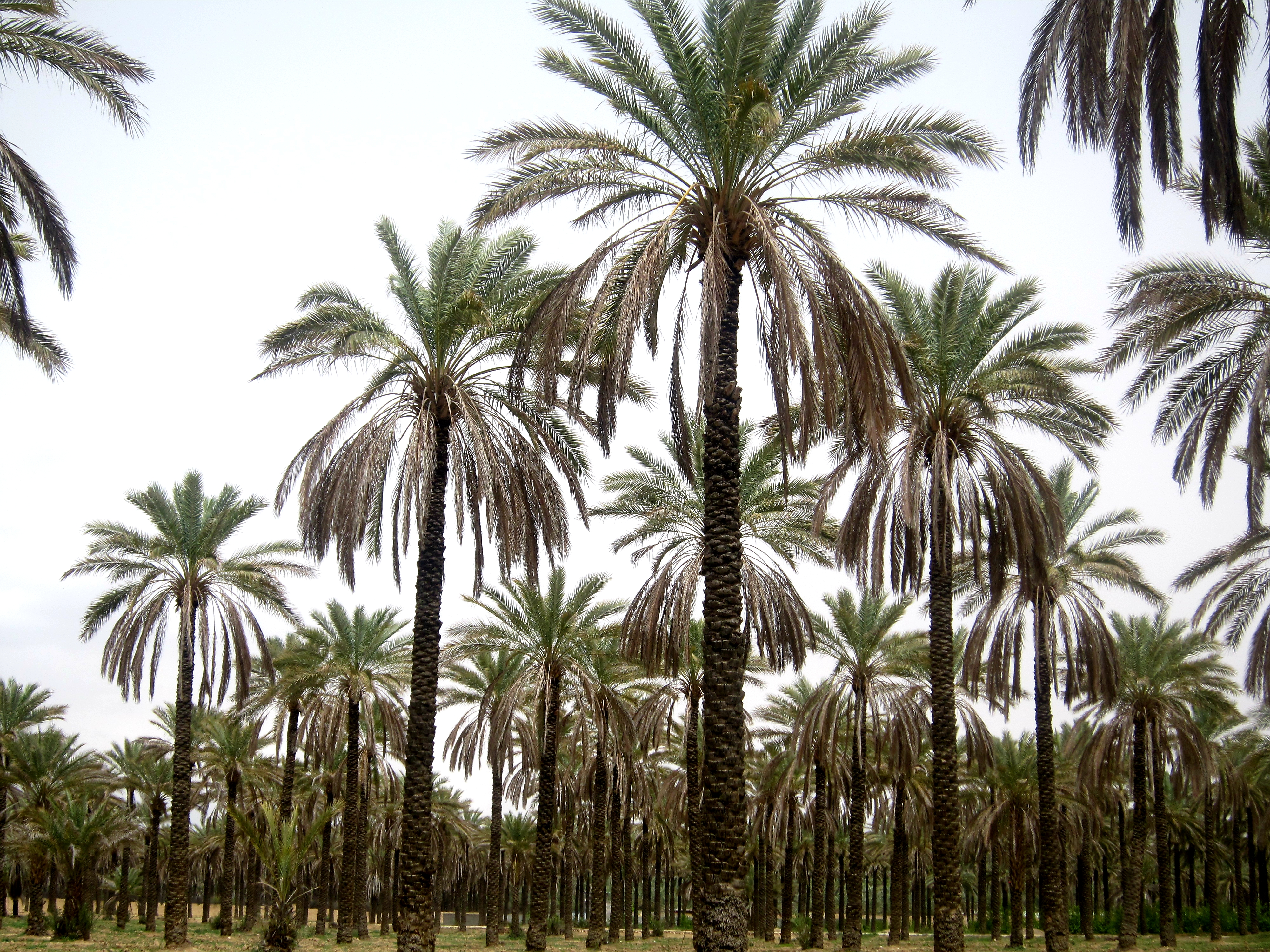 باغ نخلستان جهرم